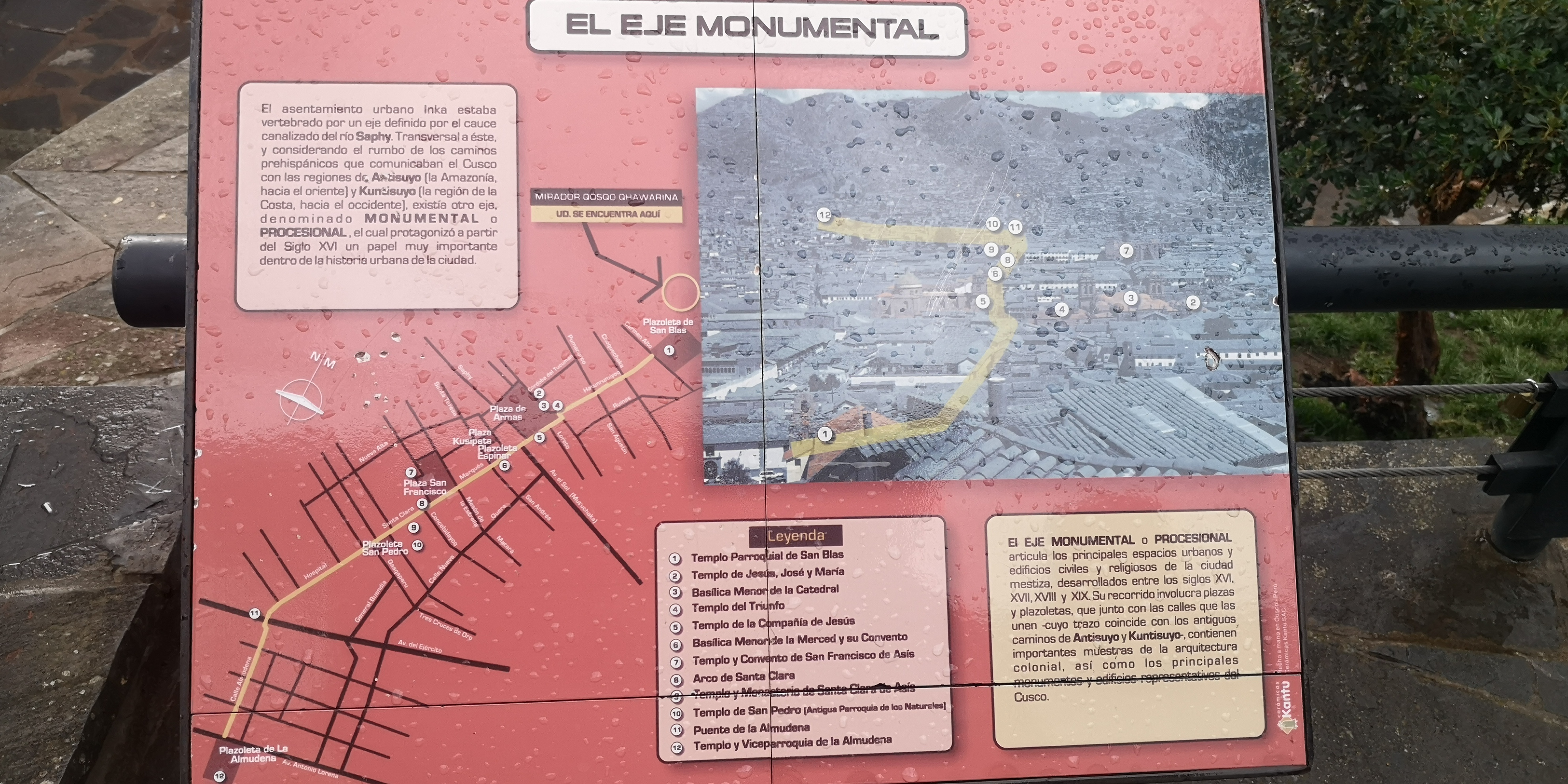 Cartel con información sobre el eje monumental de la ciudad del Cusco, Perú